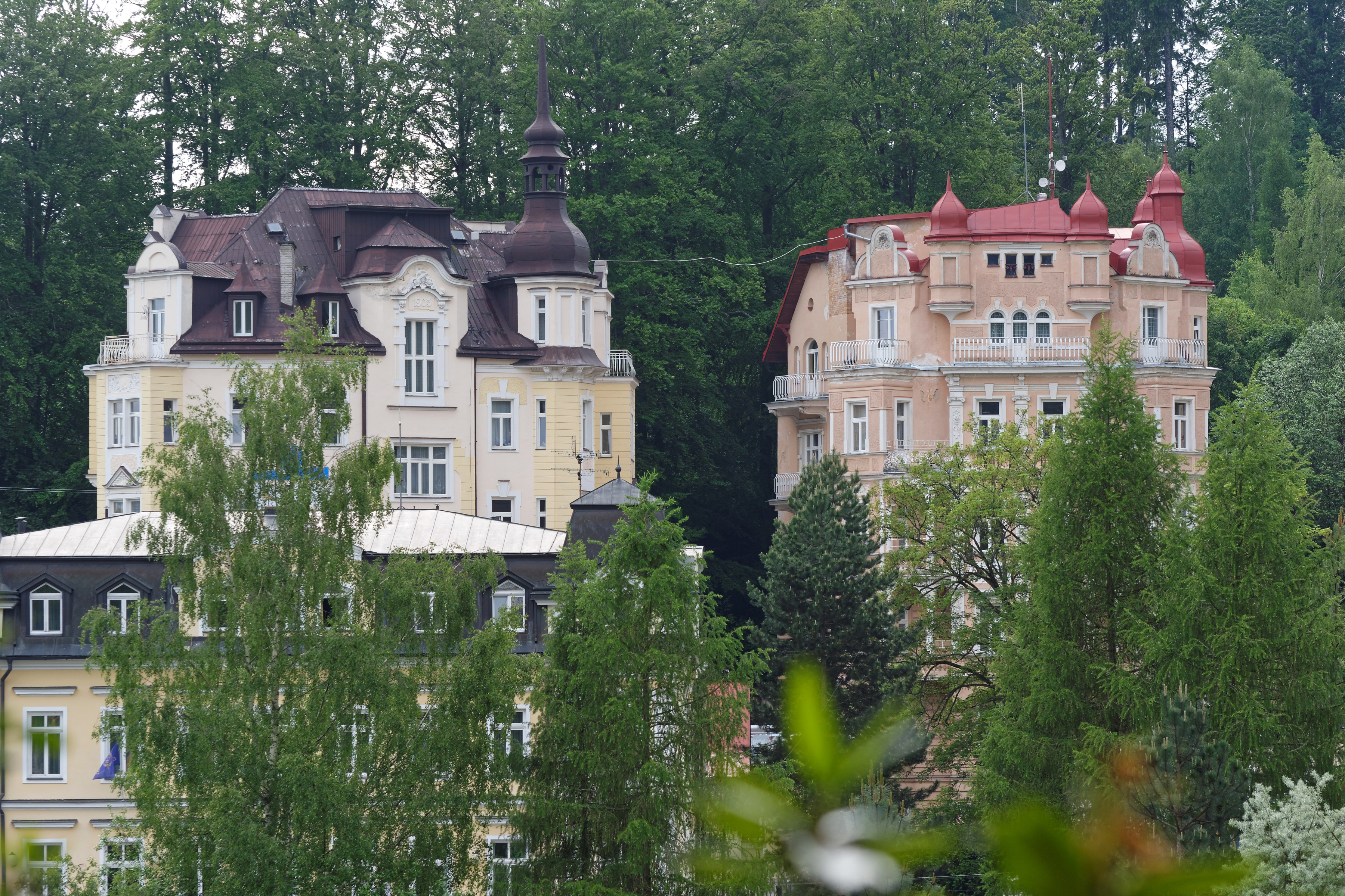 Mariánské Lázně, Lázeňský dům Balmoral - Osborne, Hlavní třída 389/14,390/14A